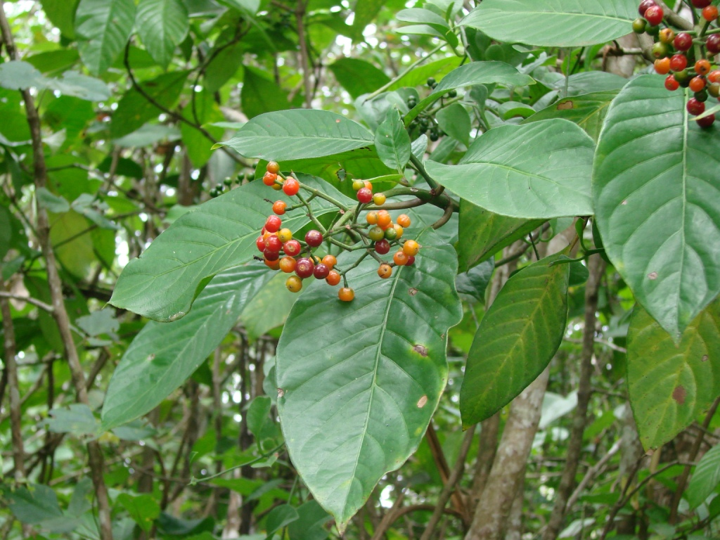 Psychotria carthagenensis - RUBIACEAE Parque Nacional de Brasília - Distrito Federal - Brasil.